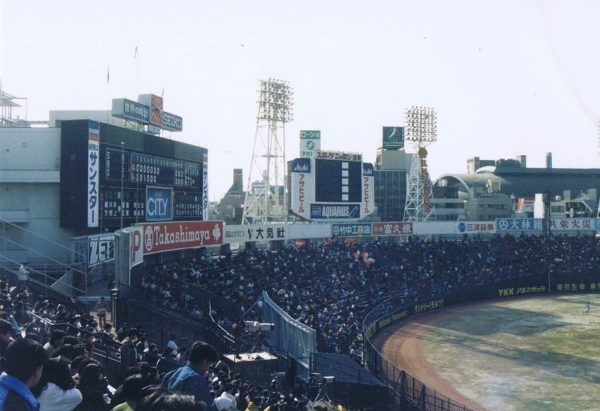 大阪球場の外野席とバックスクリーン（1989年）